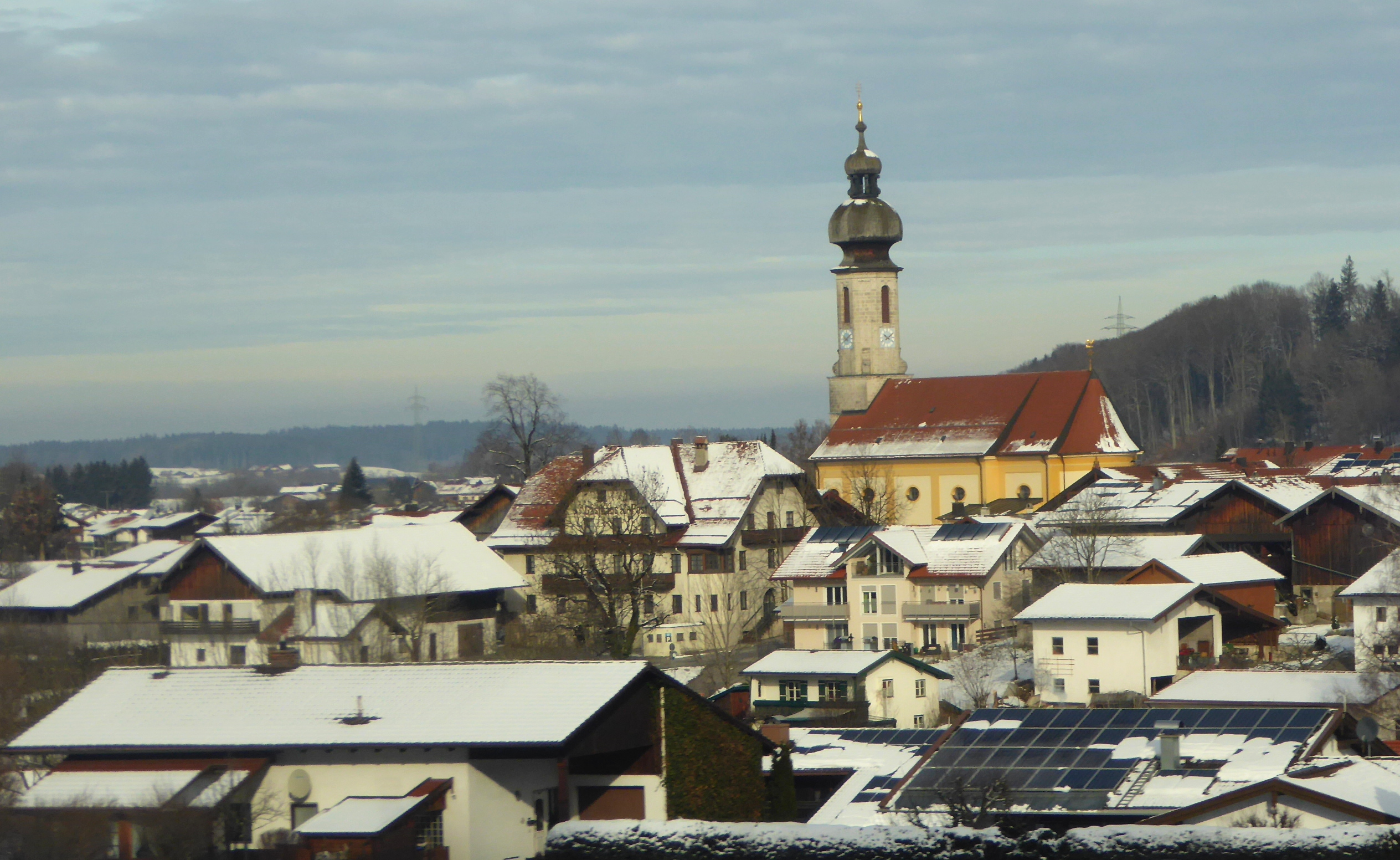 Vachendorf (Lkr. Traunstein) mit Mariä-Himmelfahrts-Kirche im Winter.